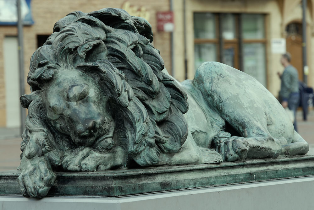 Śpiący lew, rzeźba Theodora Erdmanna Kalidego w Bytomiu.